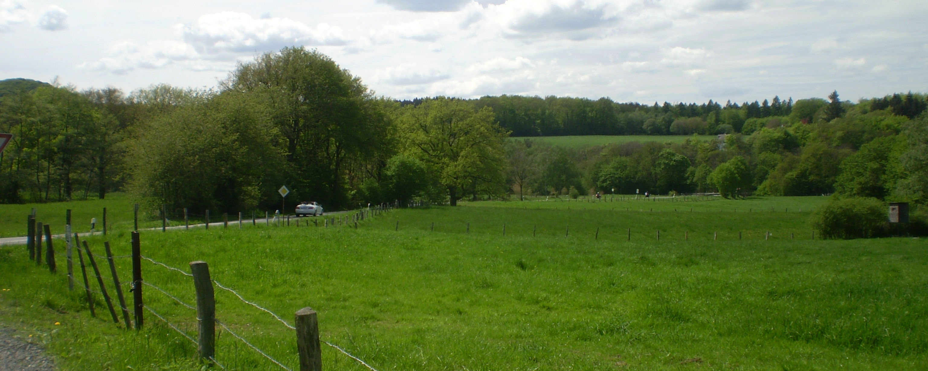 Bergseitiger Beginn der Landesstraße 144 (hier Himberger Straße) unterhalb von Neichen bzw. Himberg in Blickrichtung Tal, Aegidienberg